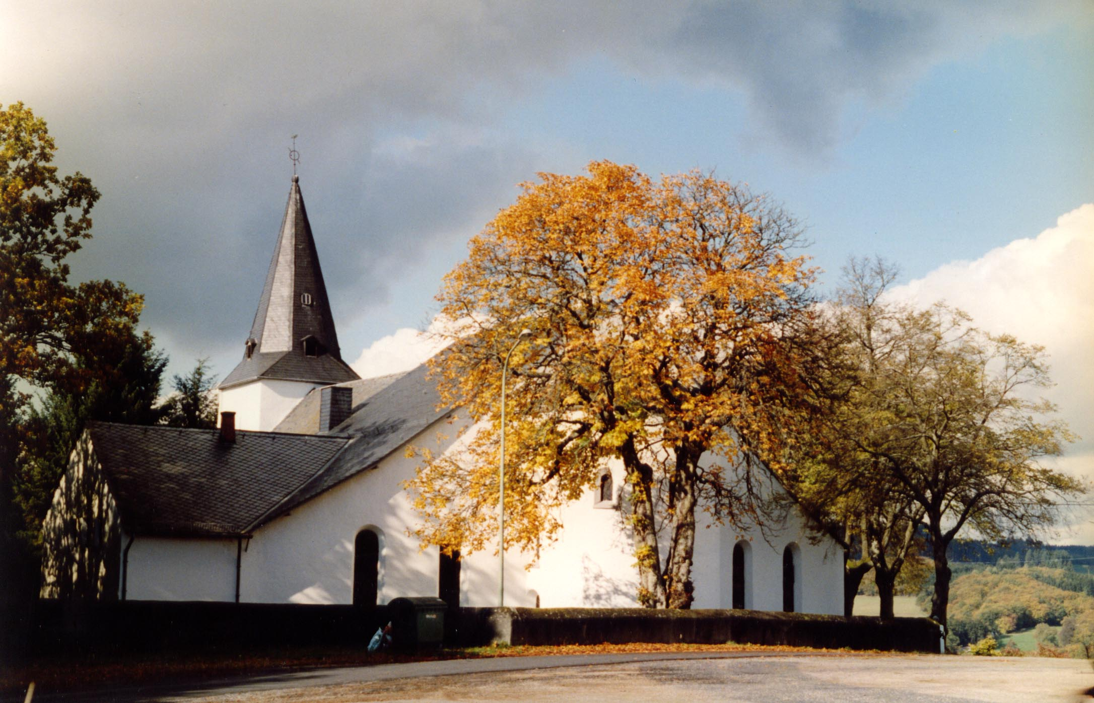 Pfarrkirche Hilgerath, Außenansicht